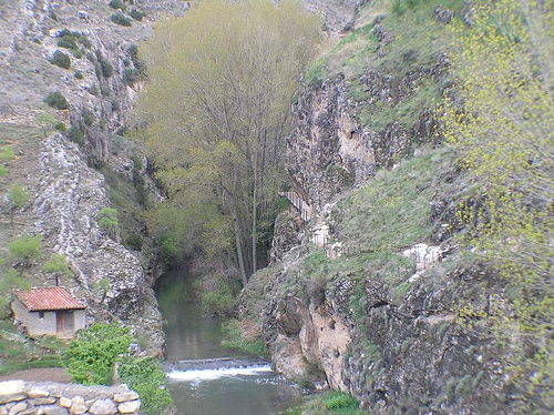 Turia River. Parte de la ruta alrededor del pueblo de Albarracín (Teruel, Aragón, Spain), en el que se observa un antiguo molino y la pasarela para cruzar el río.